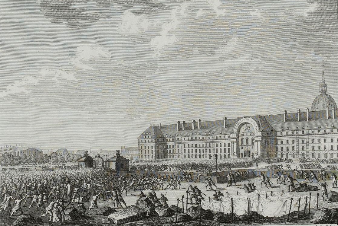 Prise des armes aux Invalides le 14 juillet 1789, Musée de la Révolution française - Vizille